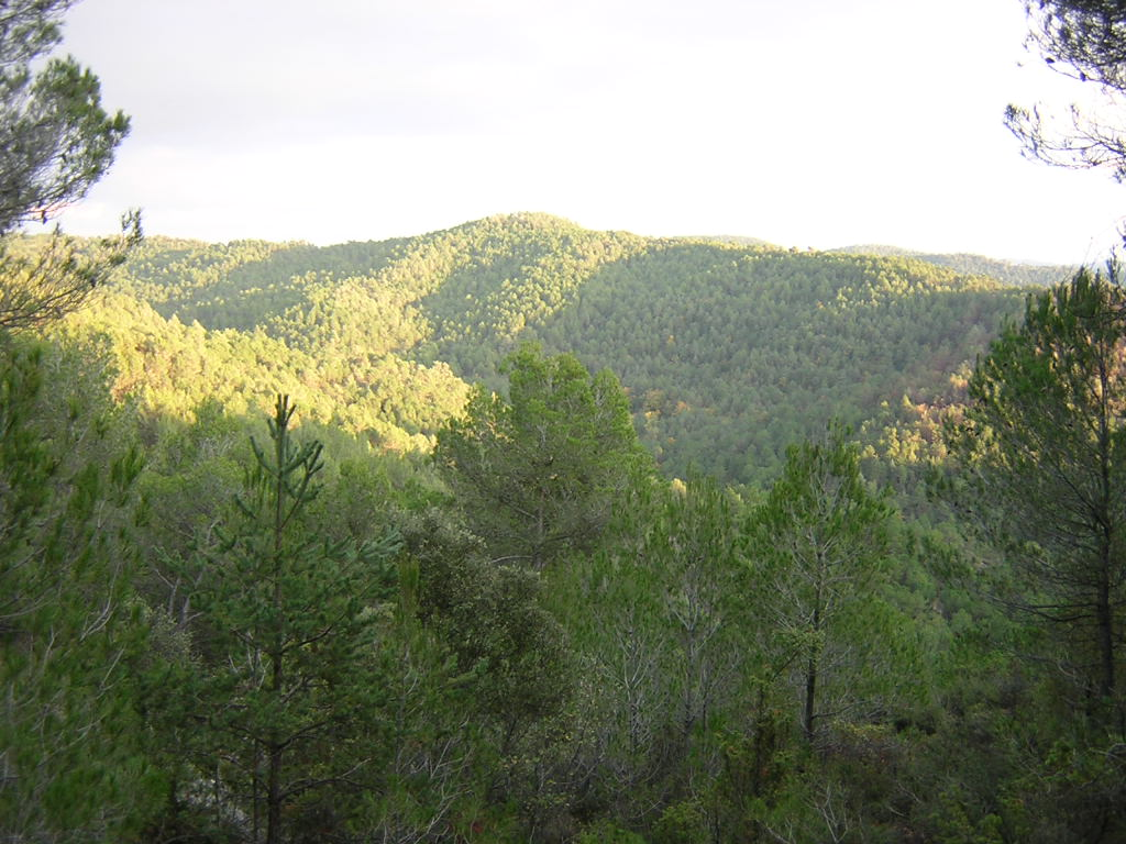 Serrat de Baiones (Monistrol de Calders, Moianès)